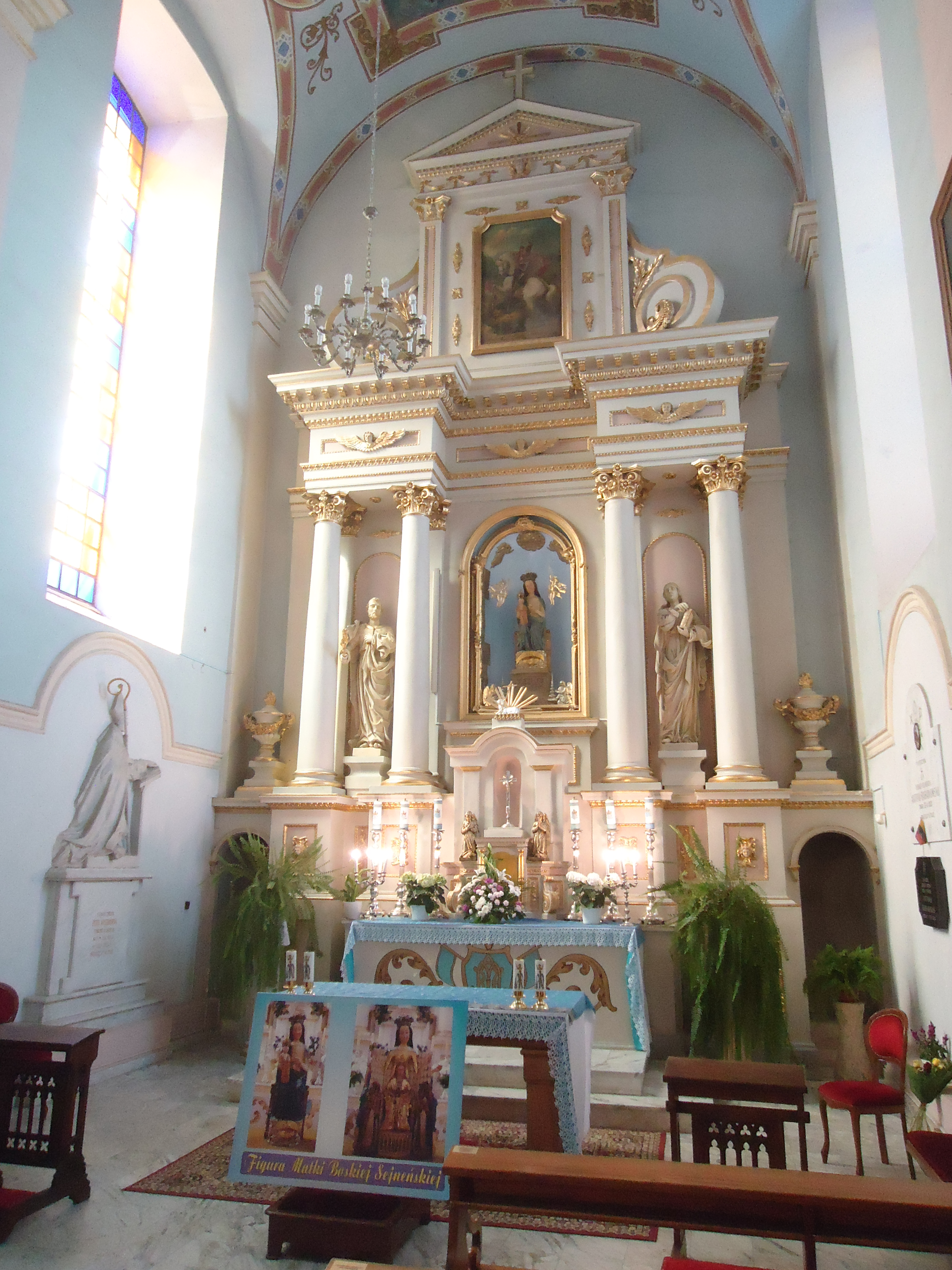 Sejny, Bazylika Nawiedzenia Najświętszej Maryi Panny w Sejnach Wikidata has entry Q9167724 with data related to this item.